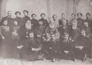 Перший педагогічний колектив Черкаської ЗОШ №15